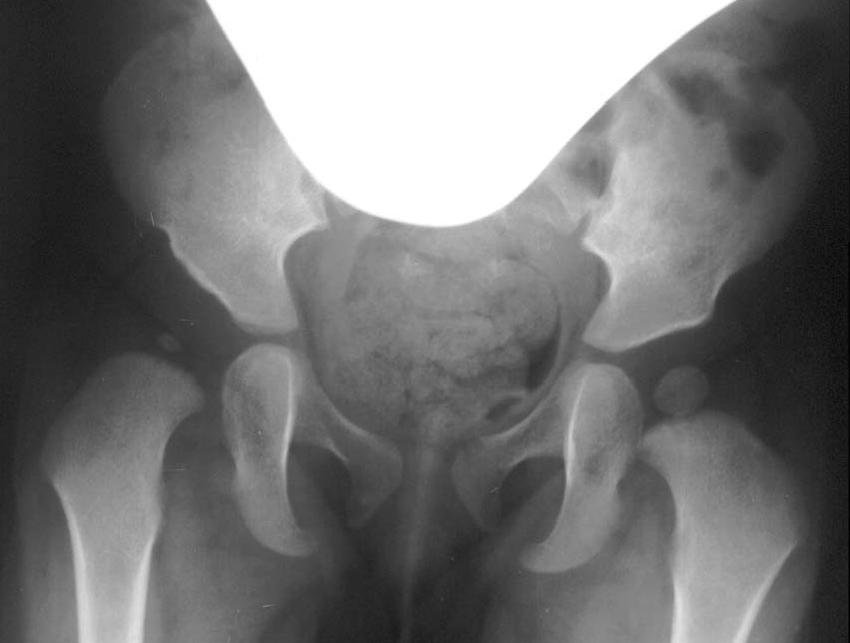 Schwere Hüftdysplasie eineds Kindes rechts Röntgen Beckenübersicht